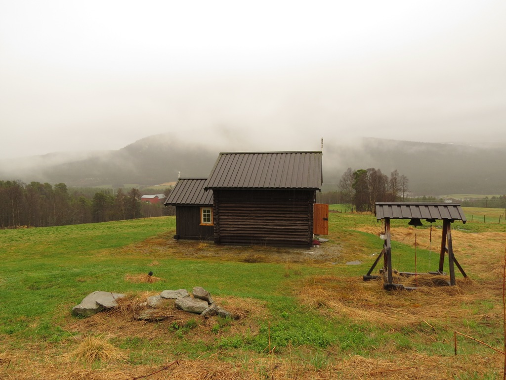 Скит святого Олафа в Фоллдале, в Норвегии